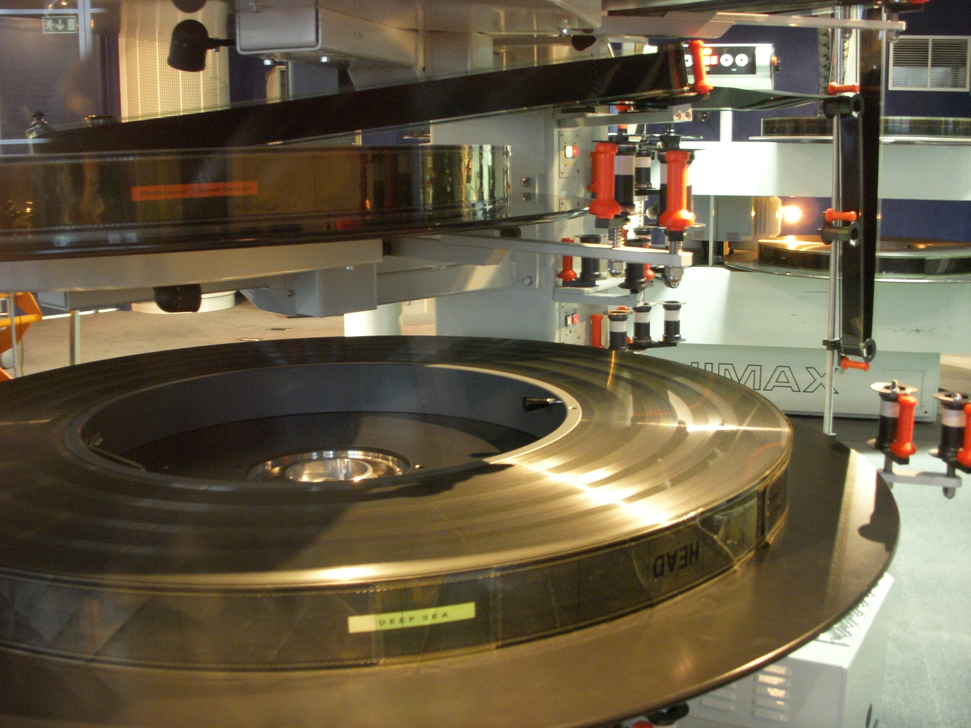 IMAX-biografen "Cosmonova" i Stockholm, maskinrummet